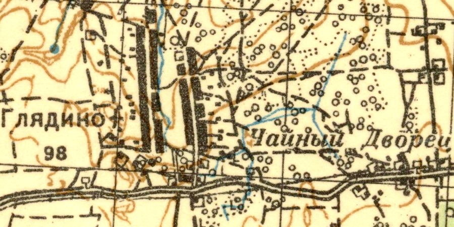 Топографическая карта Ленинградской области, квадрат О-35-12-Г (Ропша), деревня Глядино